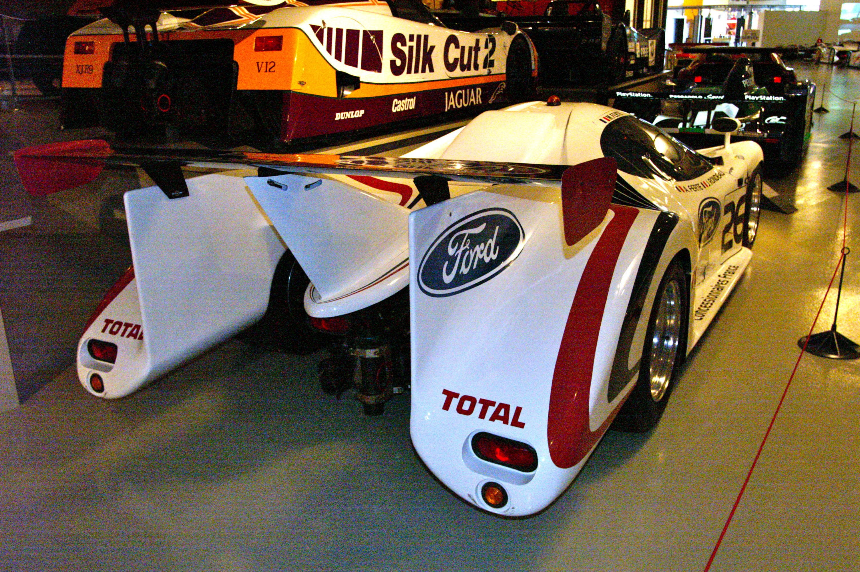 Le Musee des 24 Heures